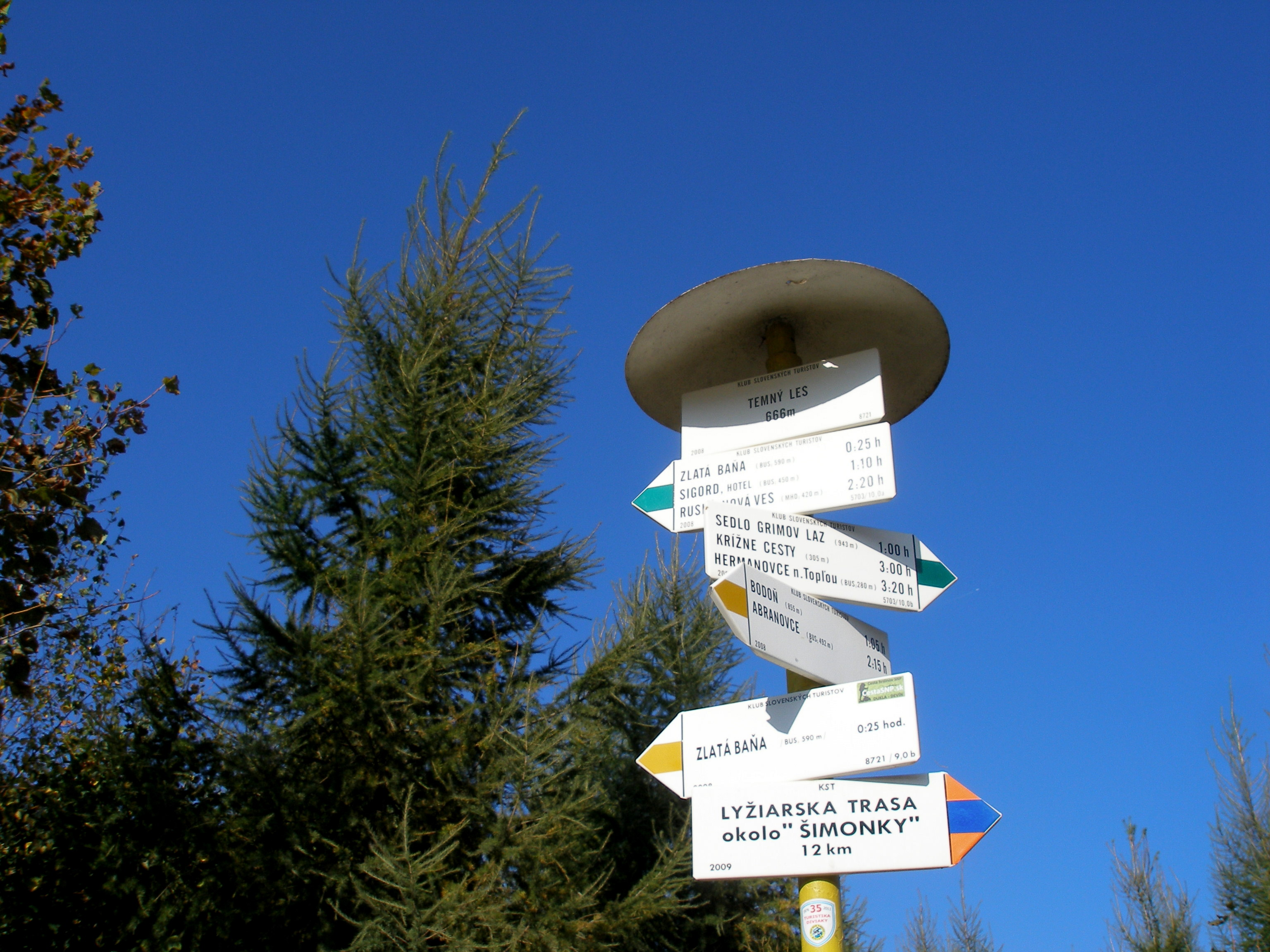 Jeseň nad obcou Zlatá Baňa okres Prešov. Slanské pohorie.